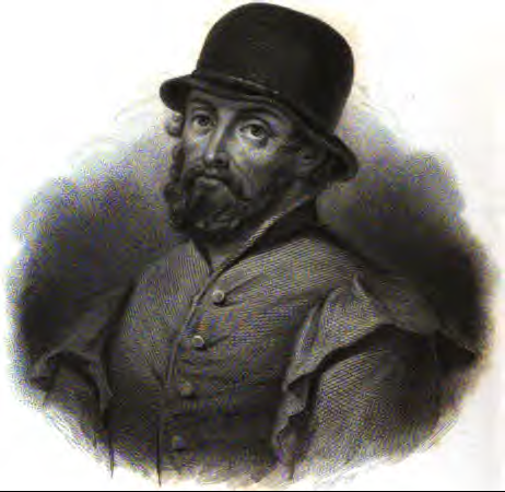 Lope de Rueda/ Imagen del autor dramático español /Sacada de "los orígenes del TEATRO ESPAÑOL" Por DON L. F. de MORATÍN/ PARÍS - 1838